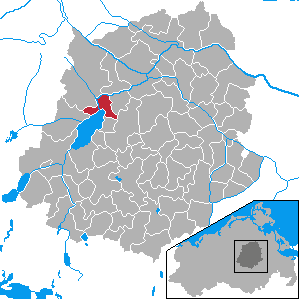 Verchen, Landkreis Demmin, Mecklenburg-Vorpommern